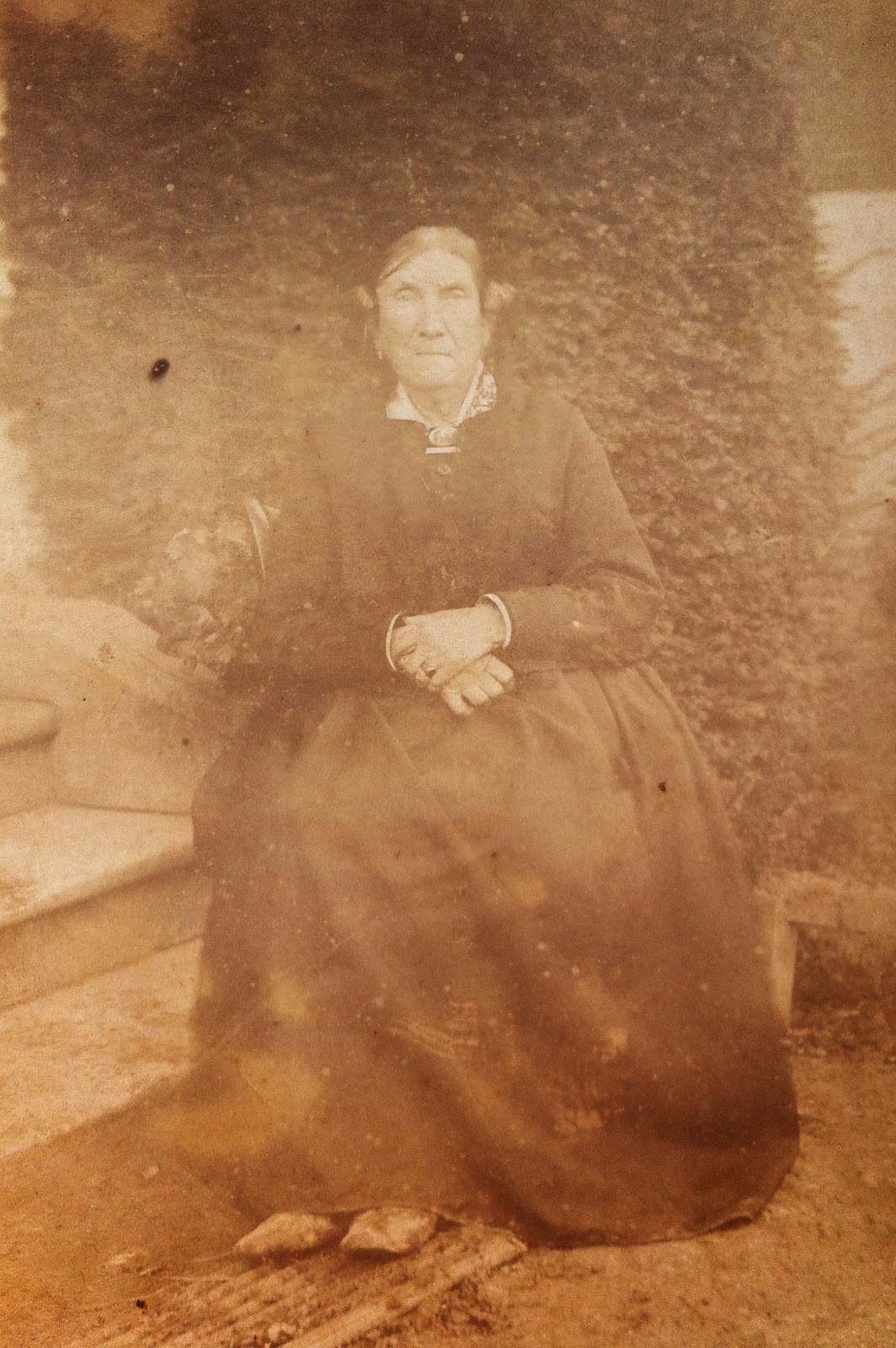 Cora_Millet-Robinet à la Berlonnière, Saint-Benoît (Vienne); photo c. 1880